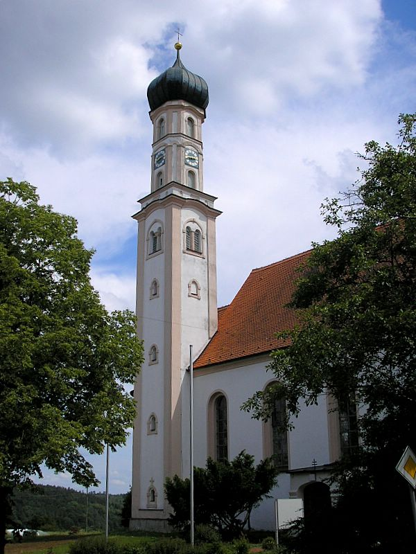 Pfarrkirche St. Laurentius (Reinhartshausen, Stadt Bobingen, Landkreis Augsburg, Bayerisch-Schwaben). Ansicht von Nordwesten. Eigene Aufnahme, Mai 2007 / Parish church St. Laurentius (Reinhartshausen near Bobingen, Bavaria, Germany). View from north-west. Own photo, May 2007